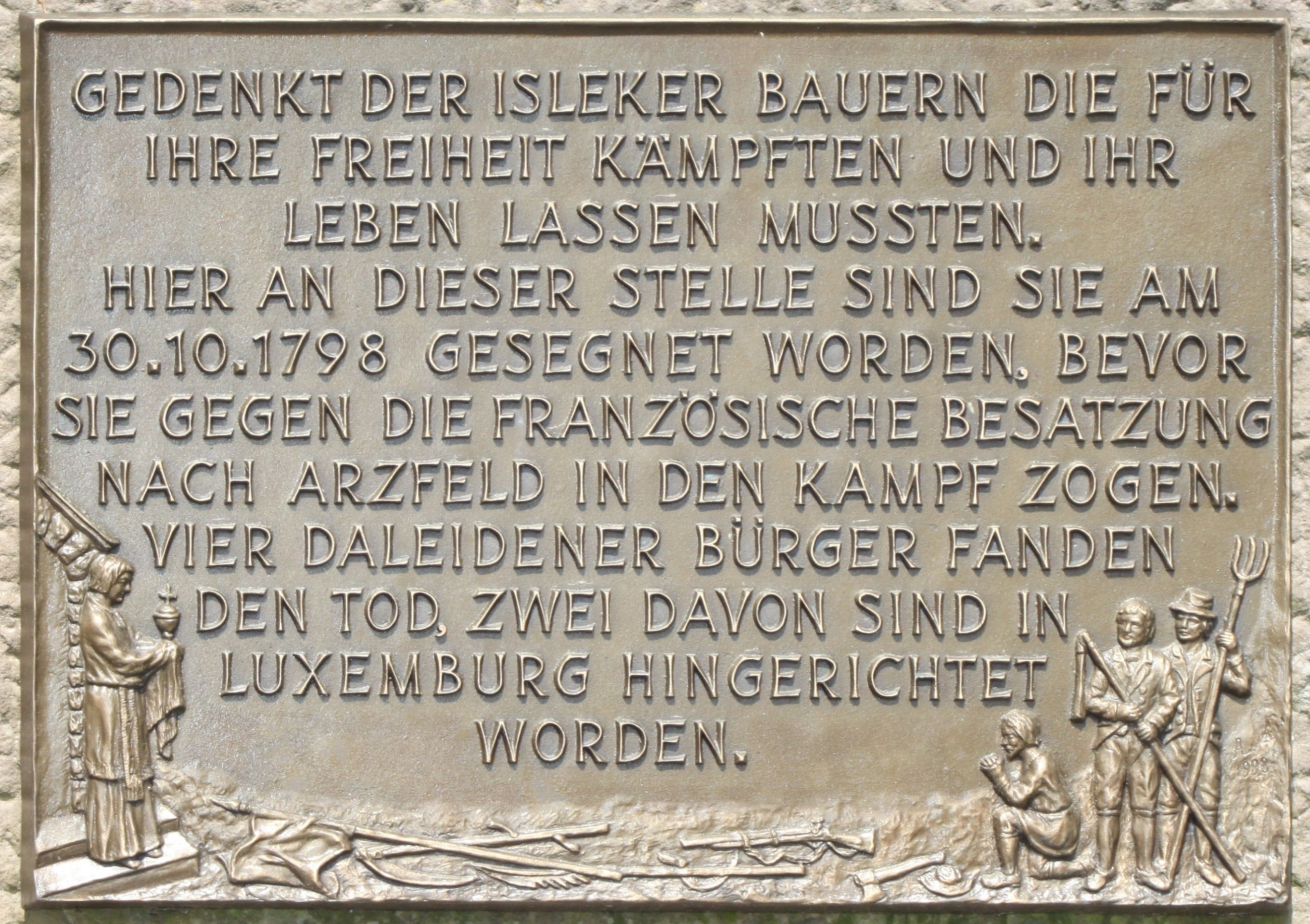 Erinnerungstafel an den Klöppelkrieg in Daleiden am Marktplatz